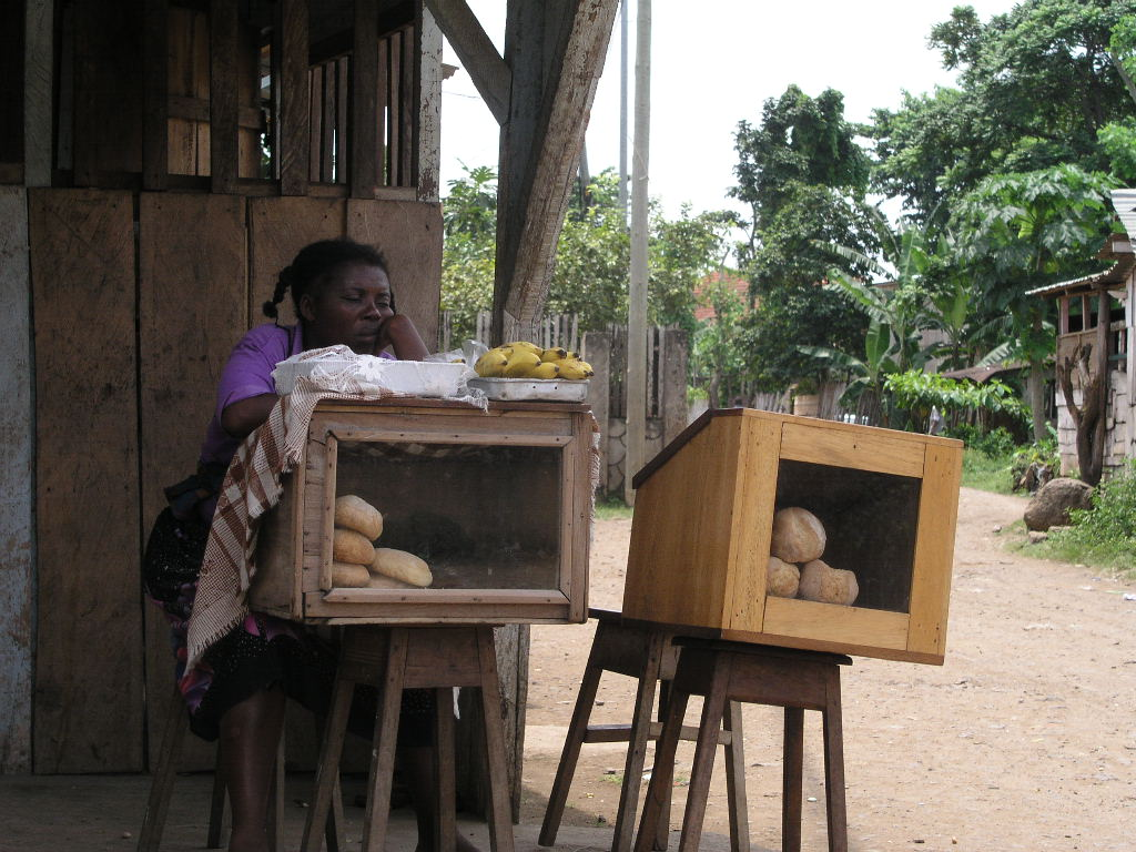 Vendendo pão na rua em São Tomé.